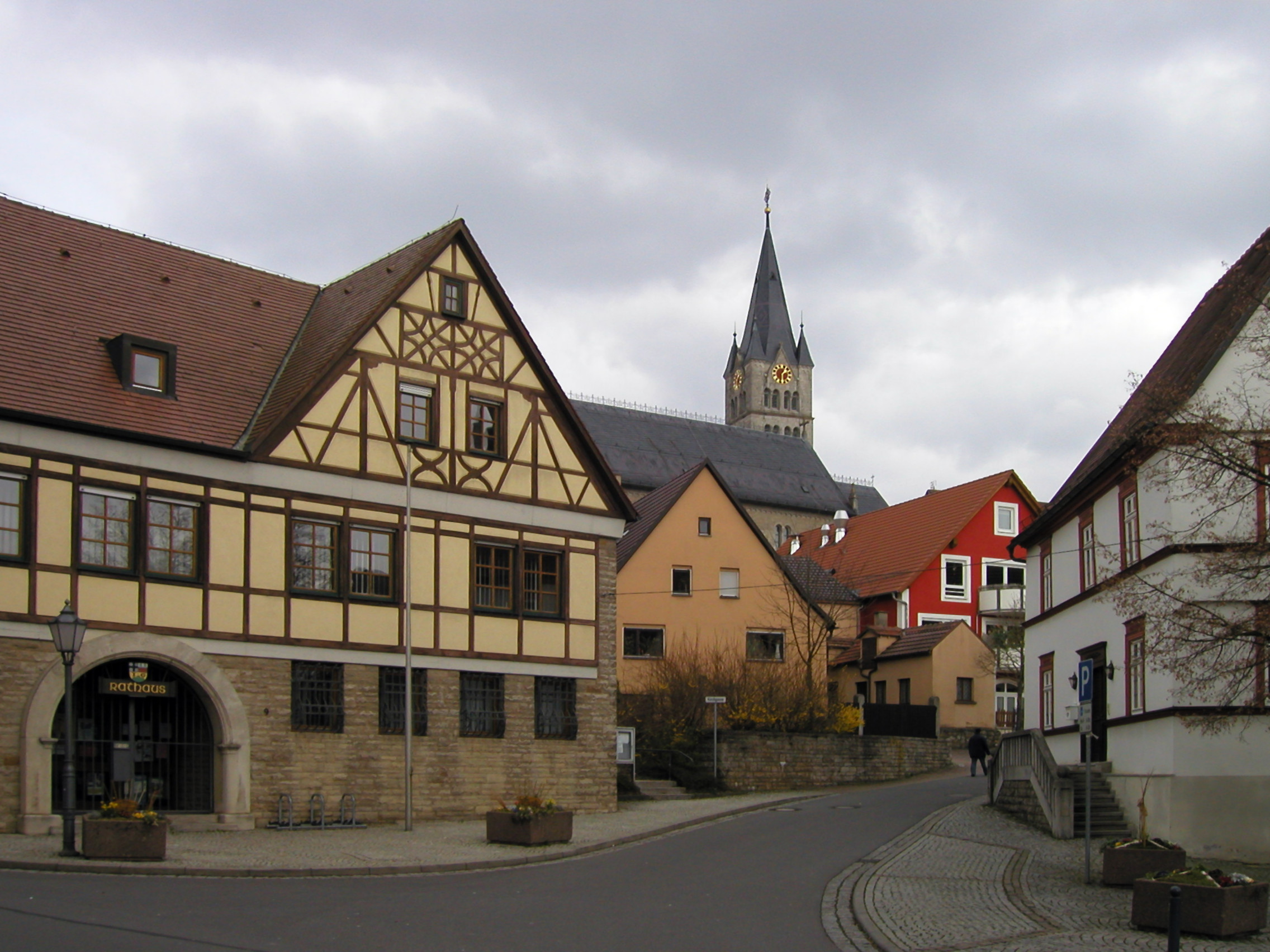 Das Rathaus und die katholische Kirche St. Michael der Gemeinde Igersheim. Blick von der Ecke Burgstraße/Kirchgasse.